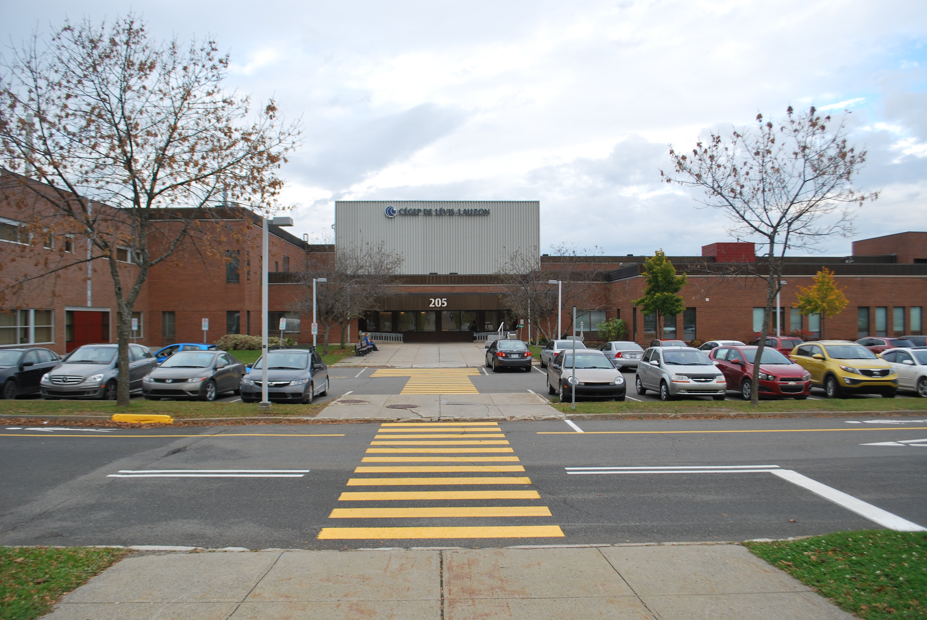 Cégep de Lévis-Lauzon.